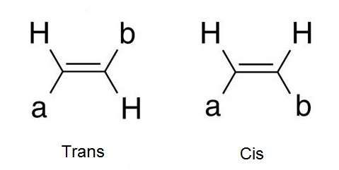 trans e cis